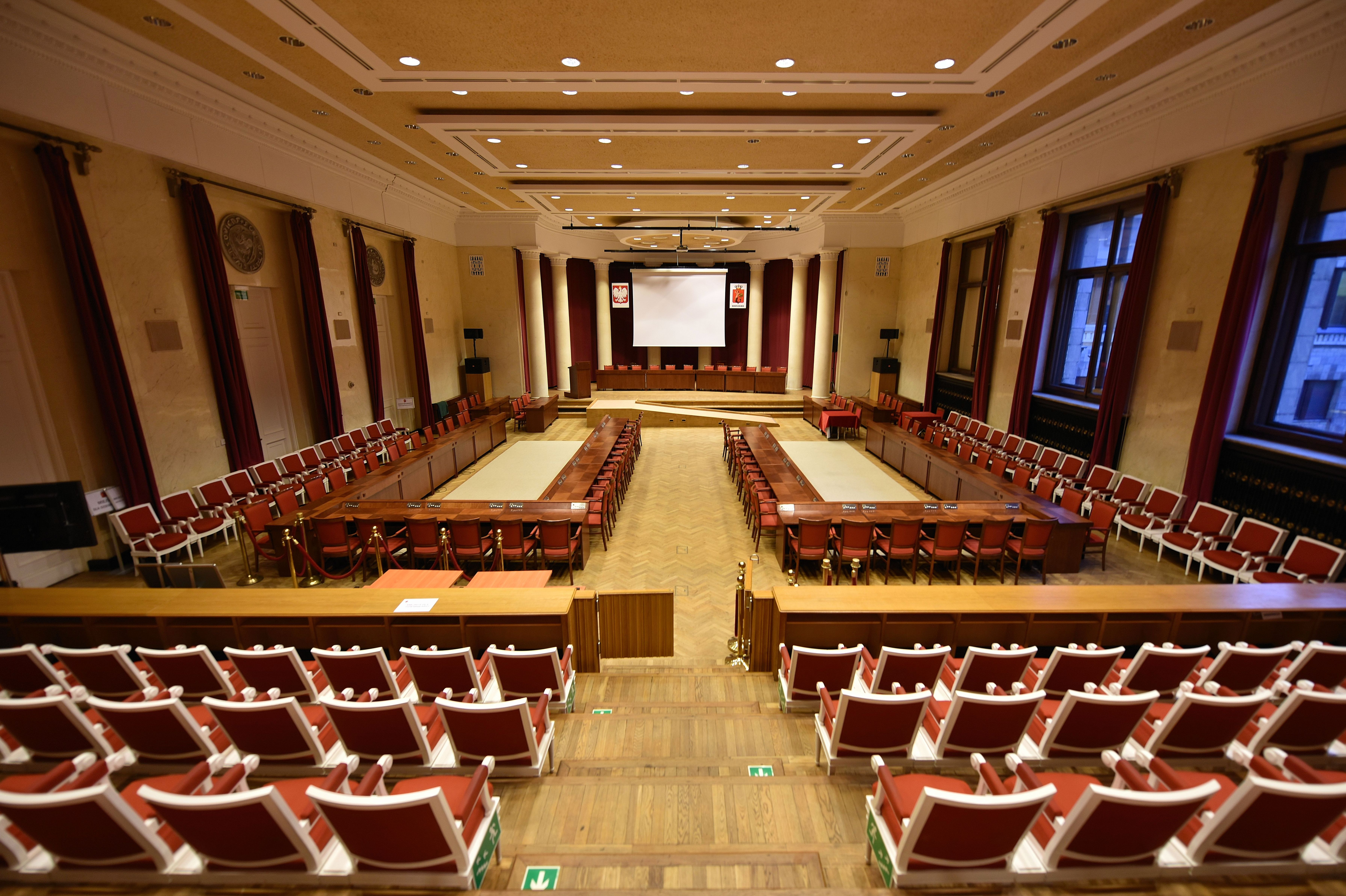 Sala Warszawska w Pałacu Kultury i Nauki w Warszawie